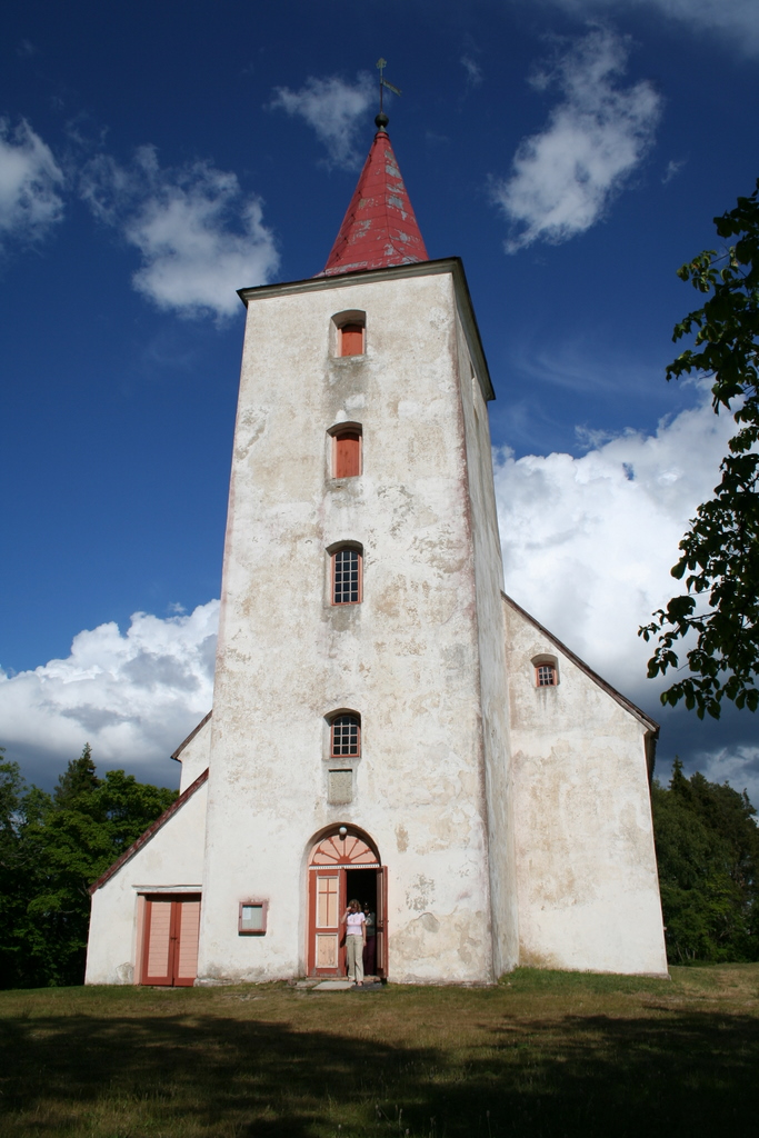 Reigi kirik